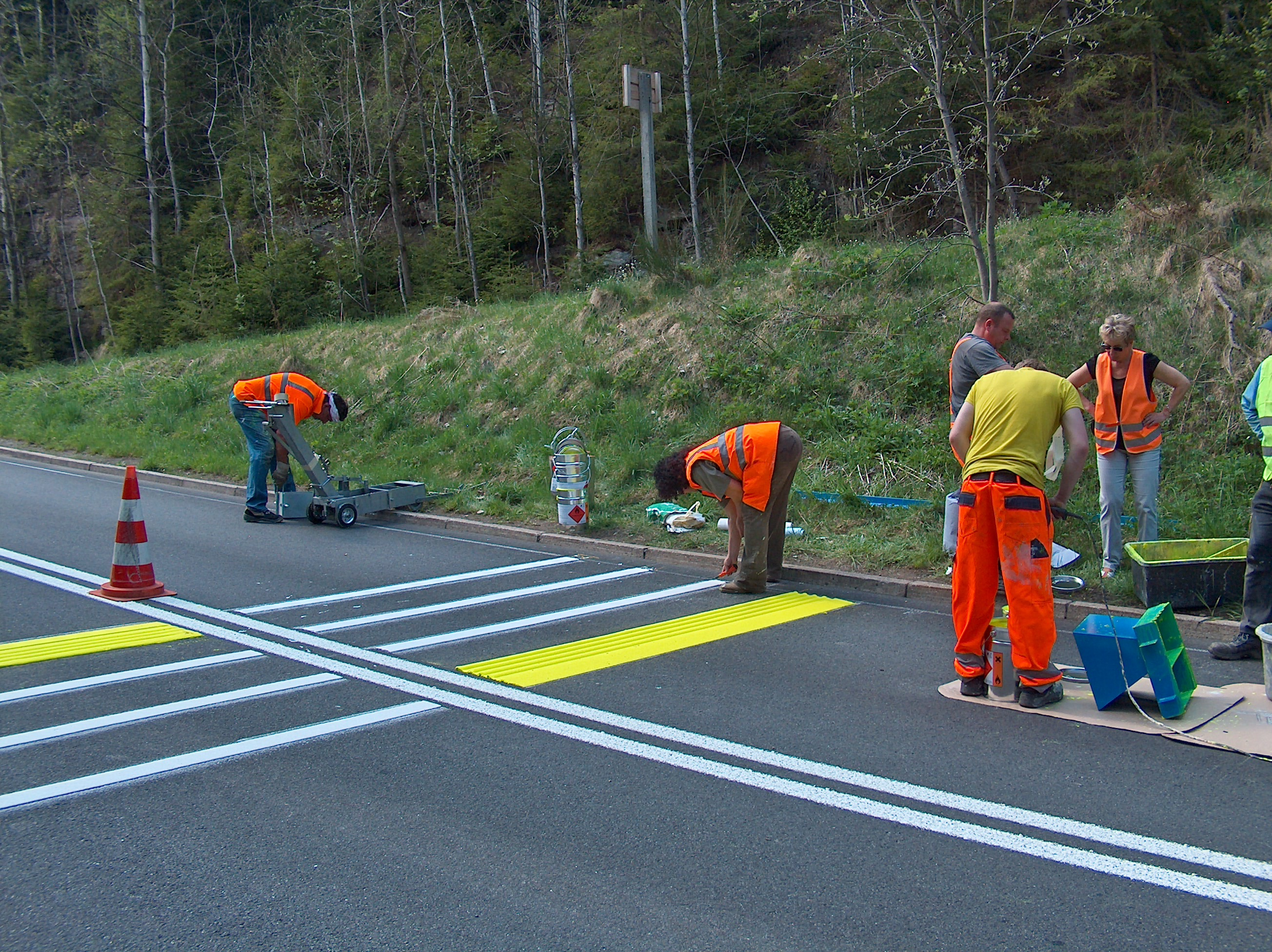 Um 180° versetzt angeordnete Rüttelstreifenfelder für jede Fahrtrichtung, bestehend aus einer profilierten, neongelb eingefärbten Dickschicht-Quermarkierung und darauf folgenden Dickschicht-Schmalstrichen.